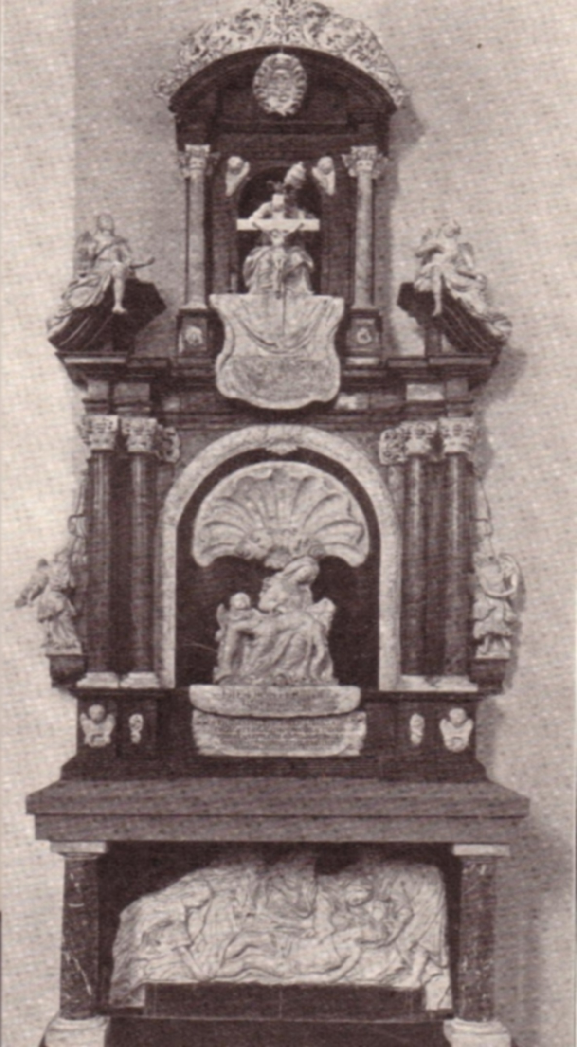 Seitenaltar St. Peter und Paul, Obernau aus der St. Agathakirche, Aschaffenburg